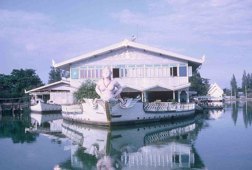 ภัตตาคารลอยน้ำในสวนลุมพินีในอดีต